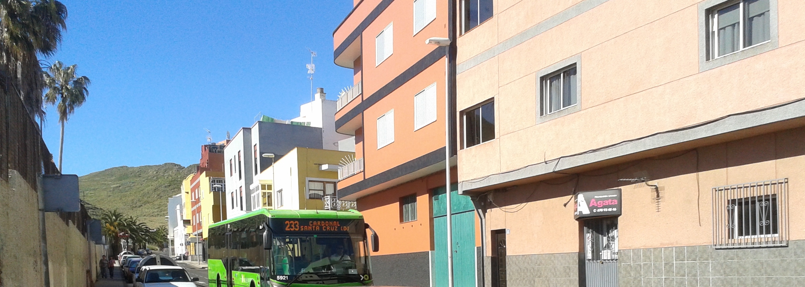 Guagua de la línea 233 de TITSA en Las Nieves, Finca España (La Laguna)